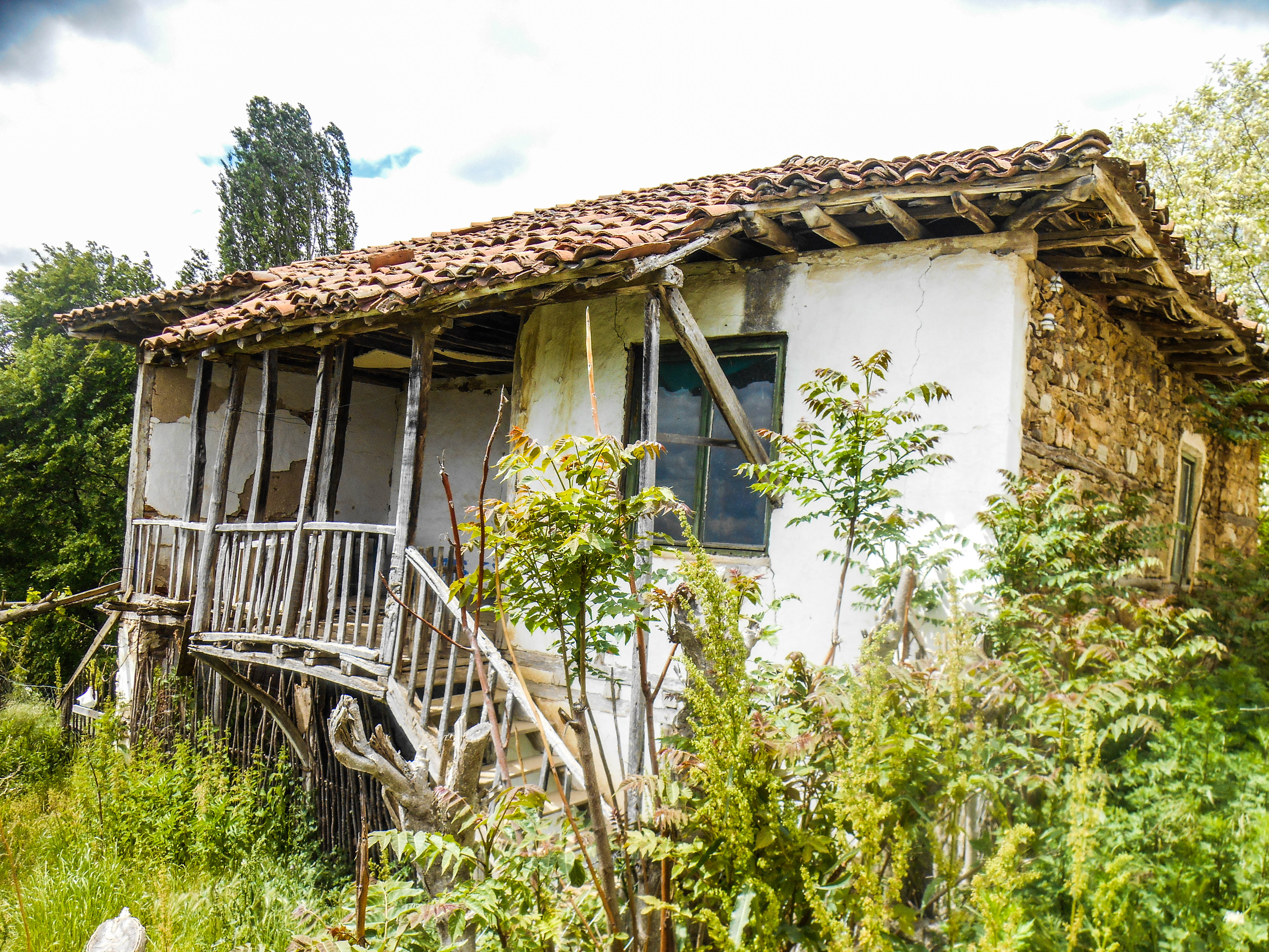 Куќа во Требичино